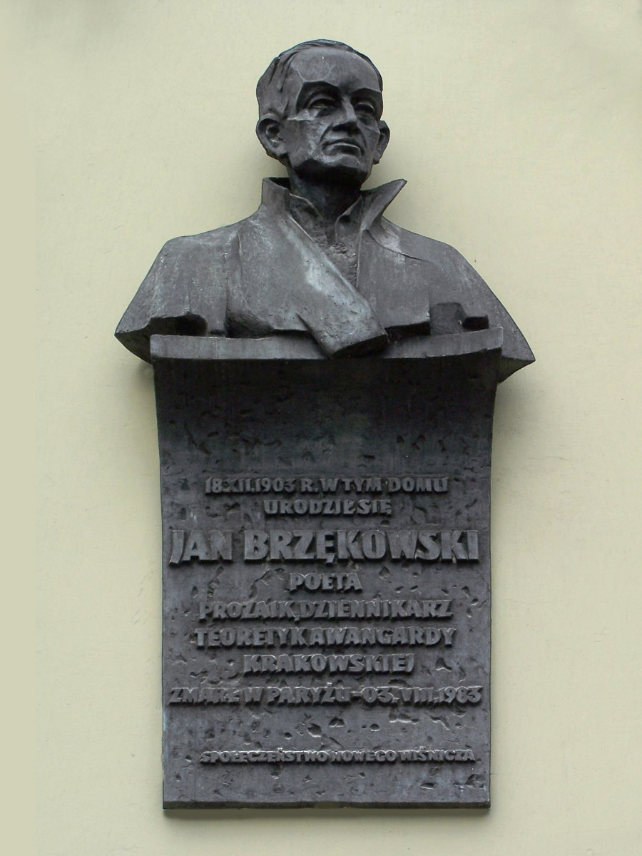 Nowy Wiśnicz - popiersie Jana Brzękowskiego na budunku UG